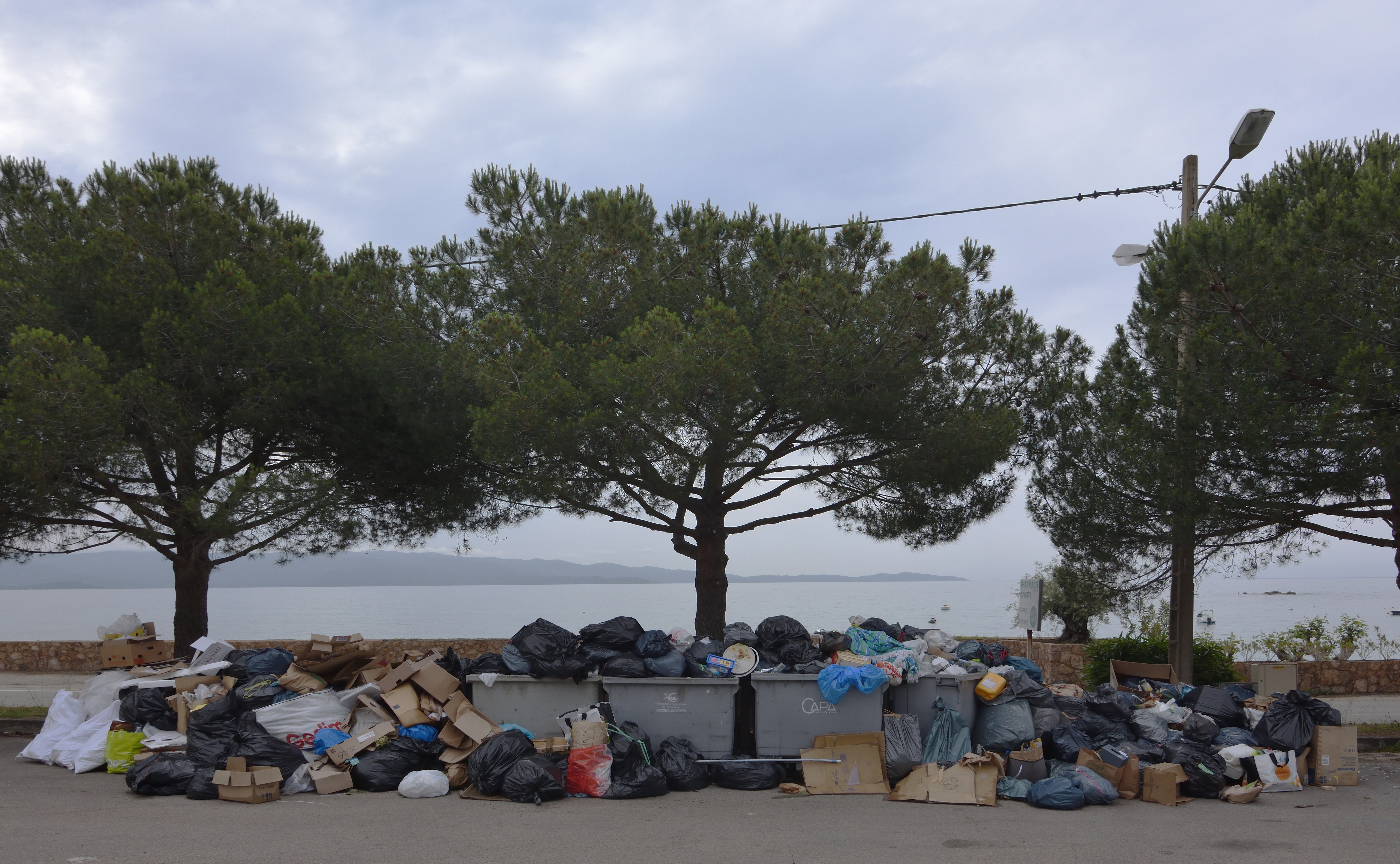 Crise des déchets en Corse 2018. Pile d`ordures au boulevard du rivage à Ajaccio.